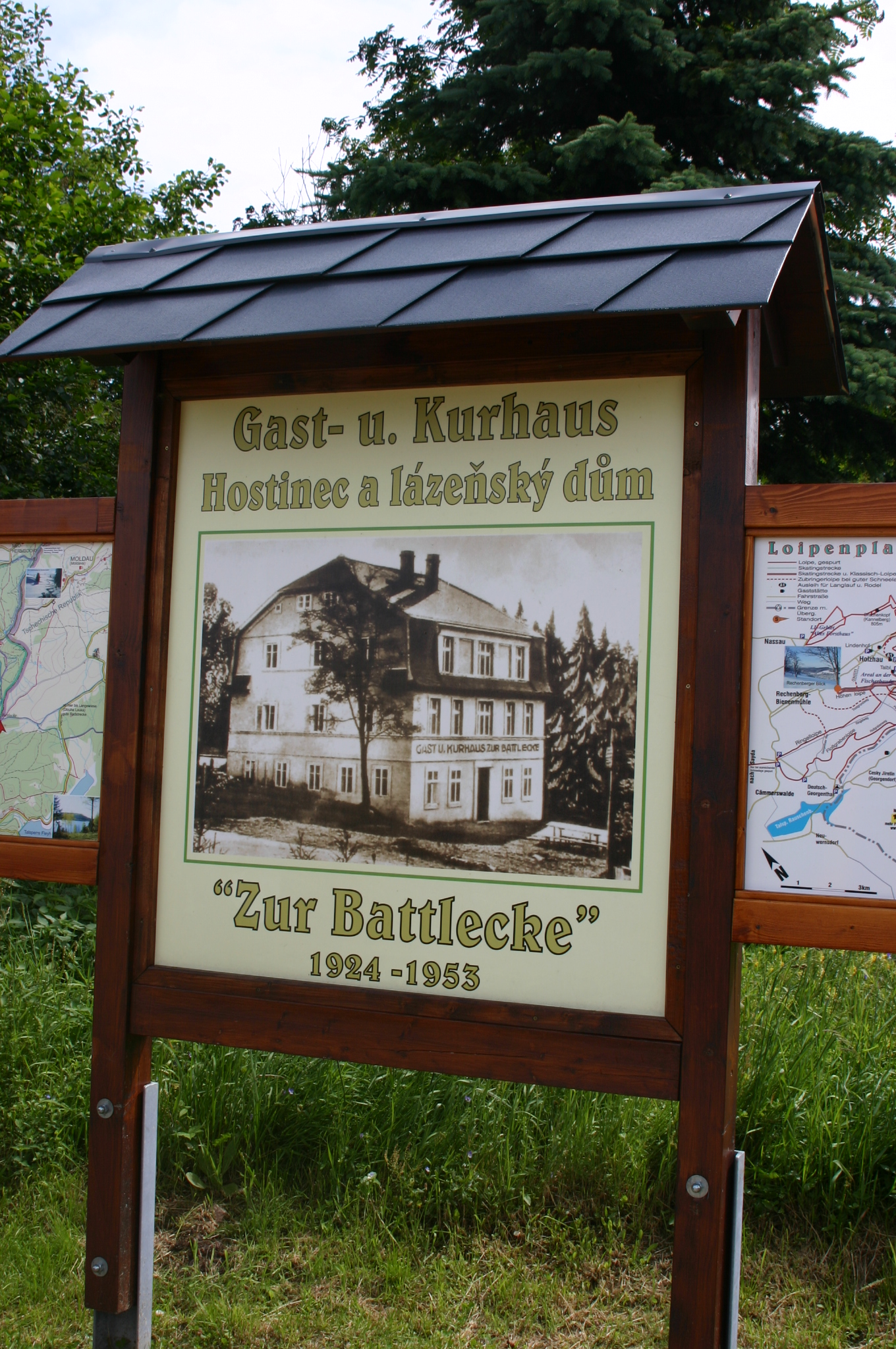 Ehemalige Ortsschaft Žebrácký roh (Battleck) in Bezirke Teplice (Teplitz)